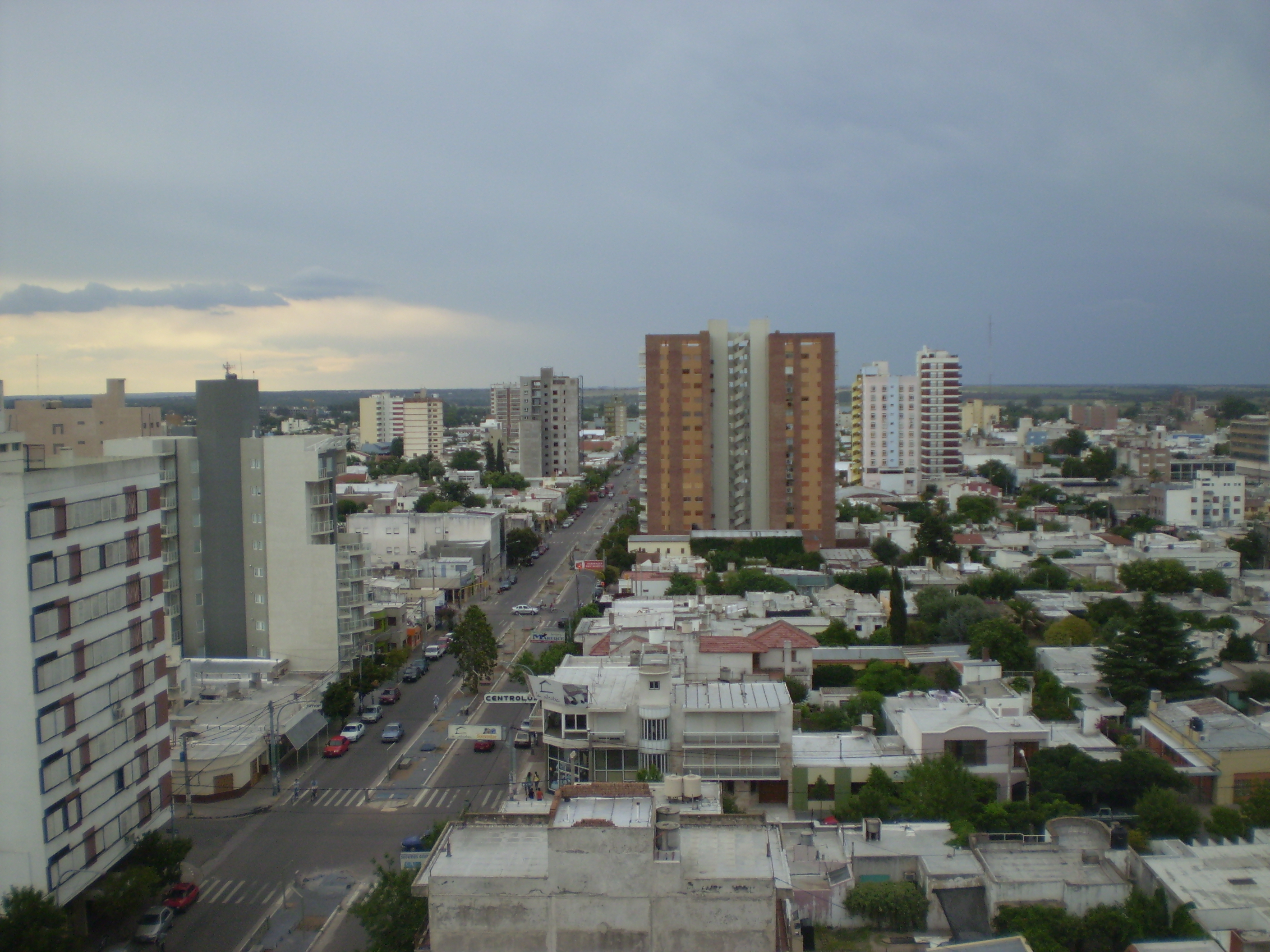 Santa Rosa, La Pampa, Argentina